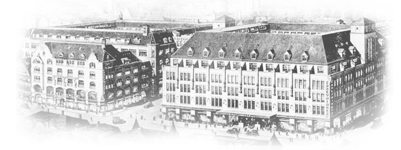 Торговый дом "Бройнингер", 1916 год